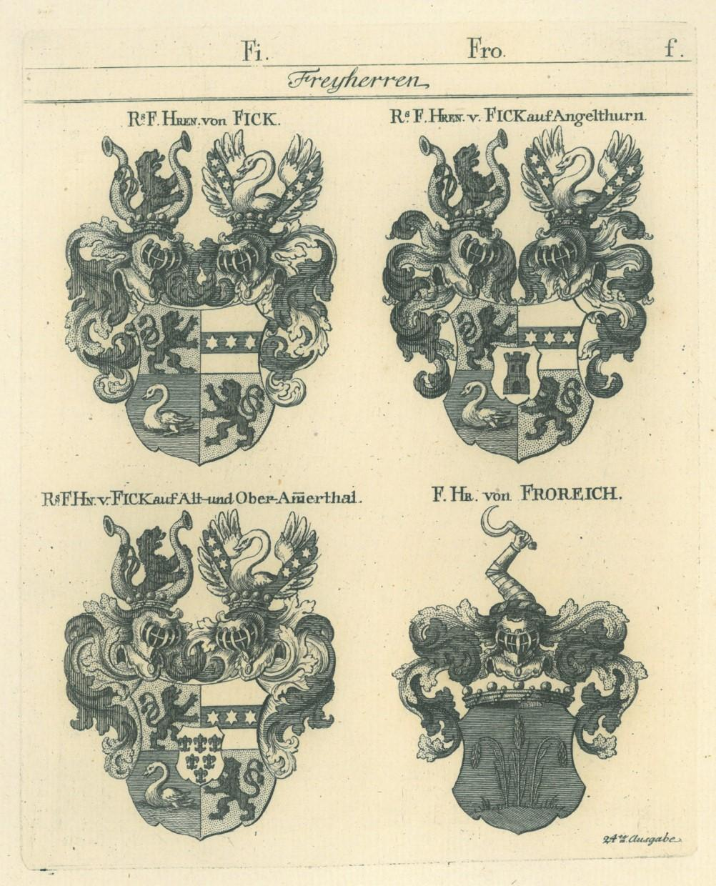 Wappenbuch Tyoff. Wappen der Freiherren von Fick. Auszug aus einem etwa 200 Jahre alten Buch